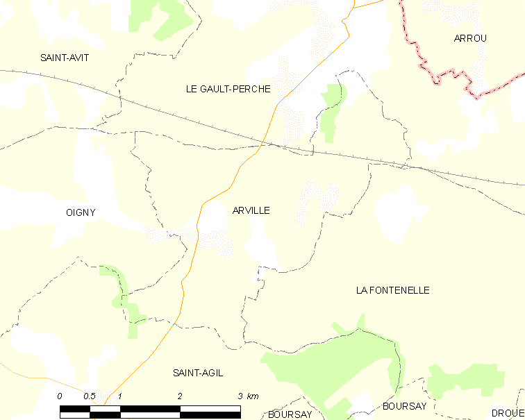 Carte des communes de France, centrée sur Arville (Loir-et-Cher, code Insee 41005)